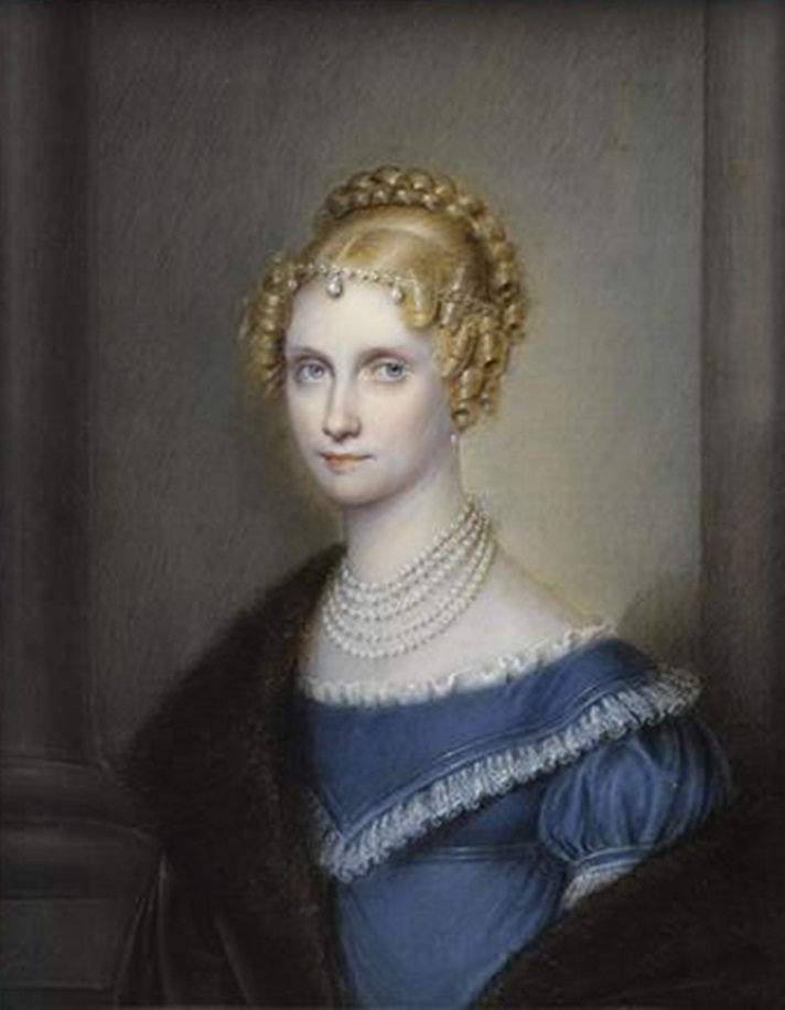 Marie-Clémentine, archiduchesse d'Autriche, princesse de Salerne (1798-1881)